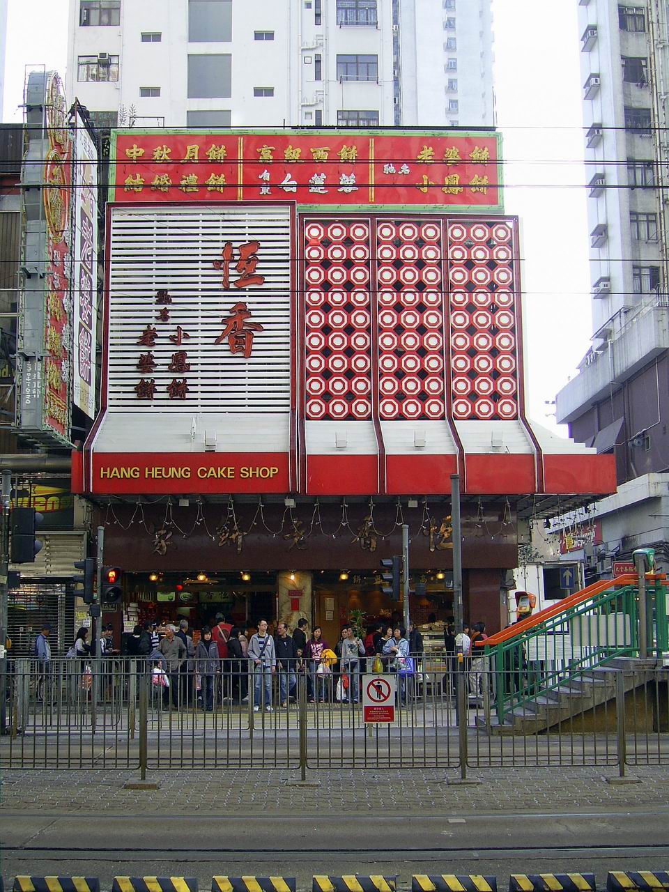 中文（香港）: 恆香老餅家